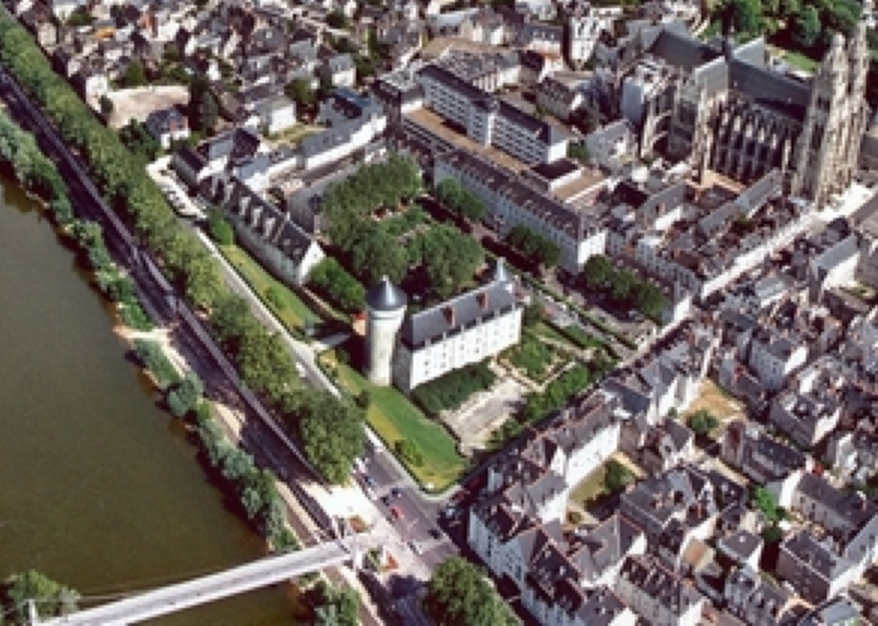 survol du vieux tours, secteur du château avec le Logis des Gouverneurs et de la cathédrale